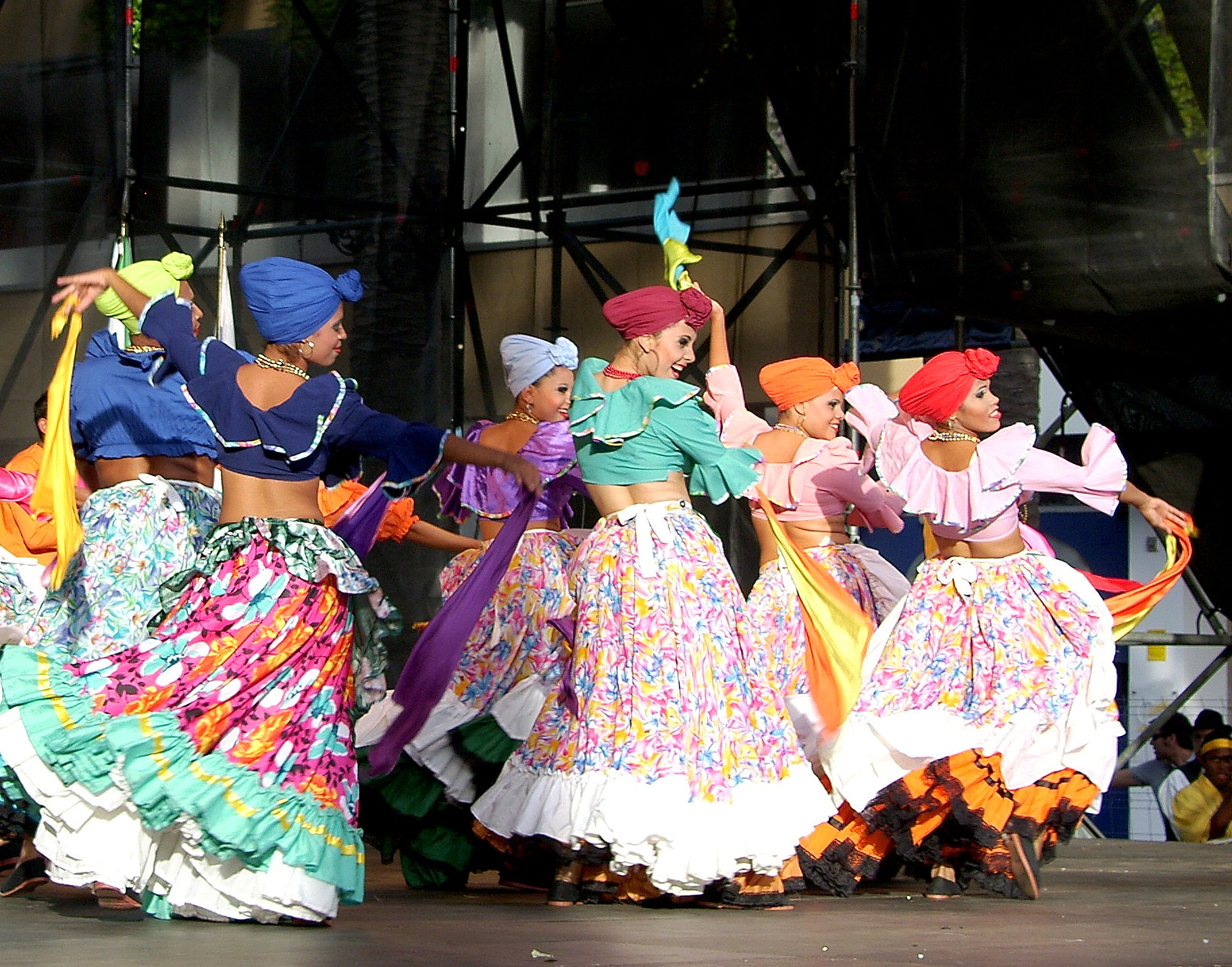 El nombre Guanare es una reducción del Guanaguanare, que es un Topónimo caquetío con que se designa "lugar de gaviotas Guanare es una localidad situada en el centro occidente de Venezuela, en el pie de monte, entre los ríos Guanare y Portuguesa. Historia El 3 de noviembre de 1591, con el nombre de «Espíritu Santo del Valle de Guanaguanare»,Juan Fernández de León funda el pueblo de Guanare. En 1859 ocurre la guerra de la federación. Los Federales al mando del General Ezequiel Zamora, se ven obligados a retirarse de Guanare, quienes incendian la Ciudad y la misma queda reducida a escombros el 5 de agosto de 1909 se promulgó la Constitución Nacional, que establecía que Venezuela estaría conformada por un Distrito Federal, dos Territorios Federales y 20 estados, uno de los cuales sería Portuguesa Guanare es un importante núcleo de atracción religiosa por las peregrinaciones a la basílica de Nuestra Señora de Coromoto. Además posee una población estimada para 2011 de 198.000 habitantes es la segunda ciudad más importante del estado Portuguesa. Es considerada por el catolicismo venezolano la capital espiritual de Venezuela, gracias a la advocación mariana de Nuestra Señora de Coromoto, a ubicada en la parroquia de la virgen del estado Portuguesa. Wikipedia.